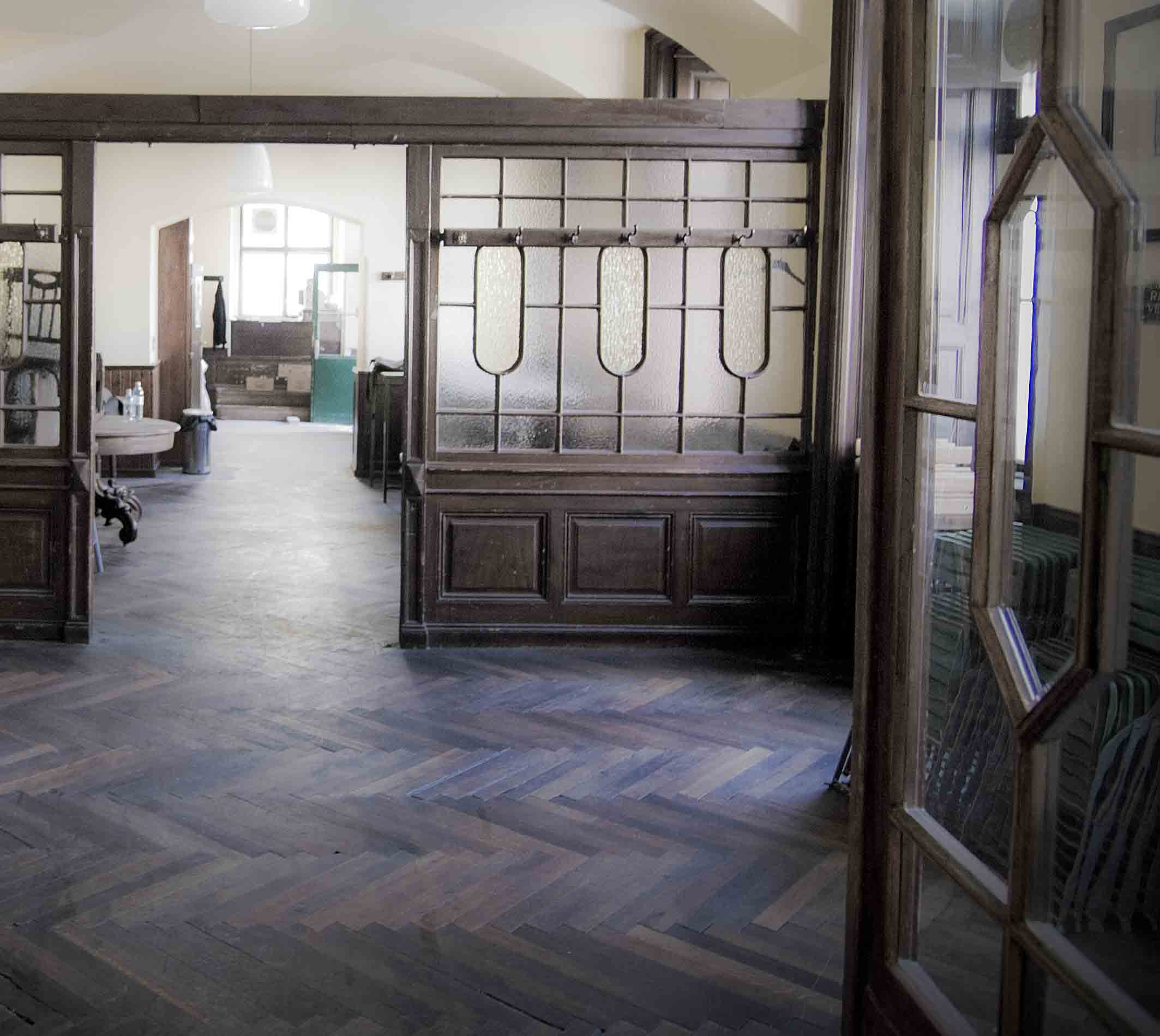 Drehort für eine Szene in Bockerer